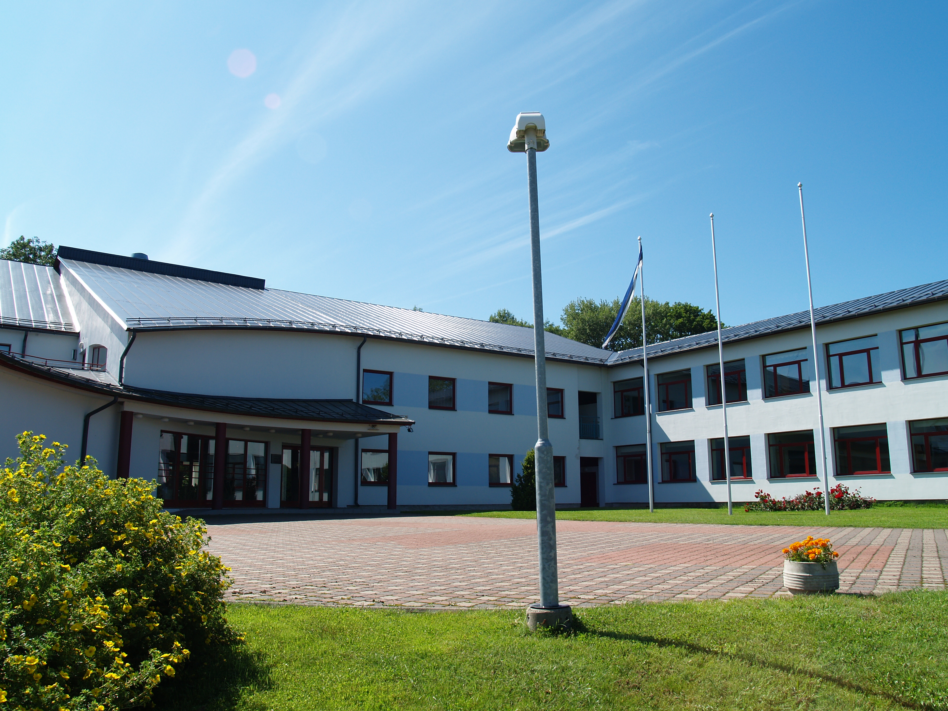 Muhu Põhikool